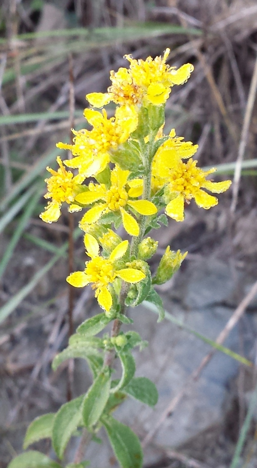 Vara d'or ('Solidago virgaurea) de Castelltallat, Bages